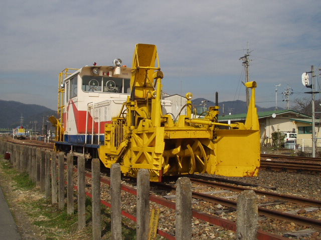 元神岡鉄道DB1 普段は本巣駅に留置されている。手前のロータリーヘッドの反対側はラッセルヘッドが装備されている。 左奥に見えるTDE10は廃車群である